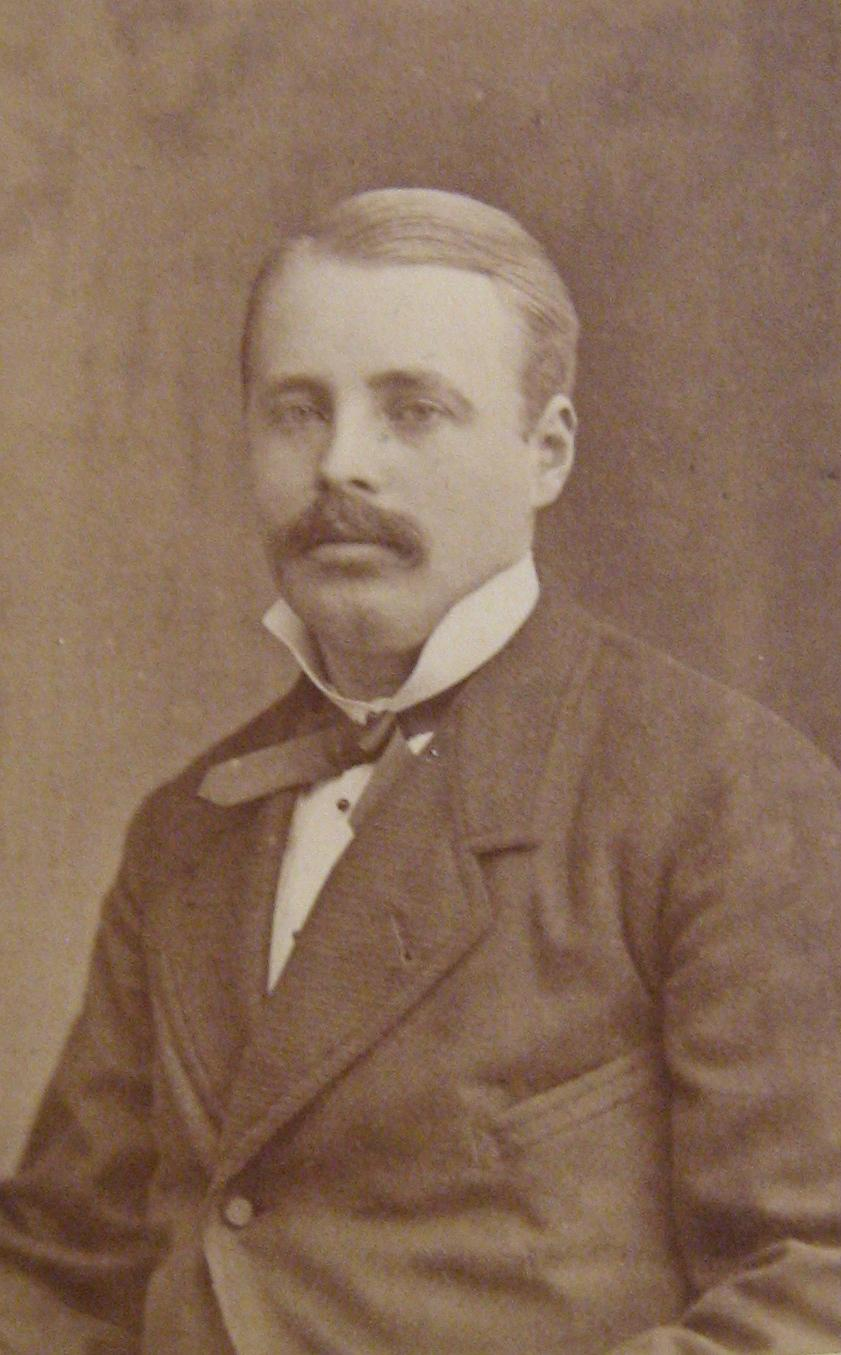 Fotografi av läkare och professor J. G. Edgren (1849-1929), av fotografen Henri Osti i Uppsala